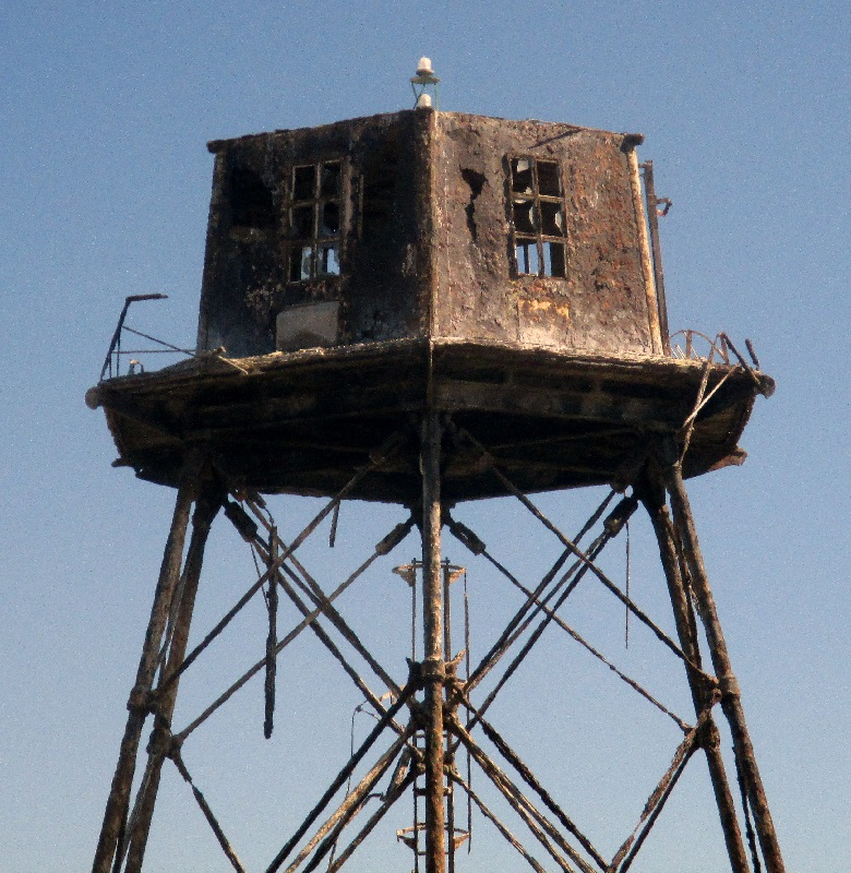 Phare désaffecté, près de Calais, France